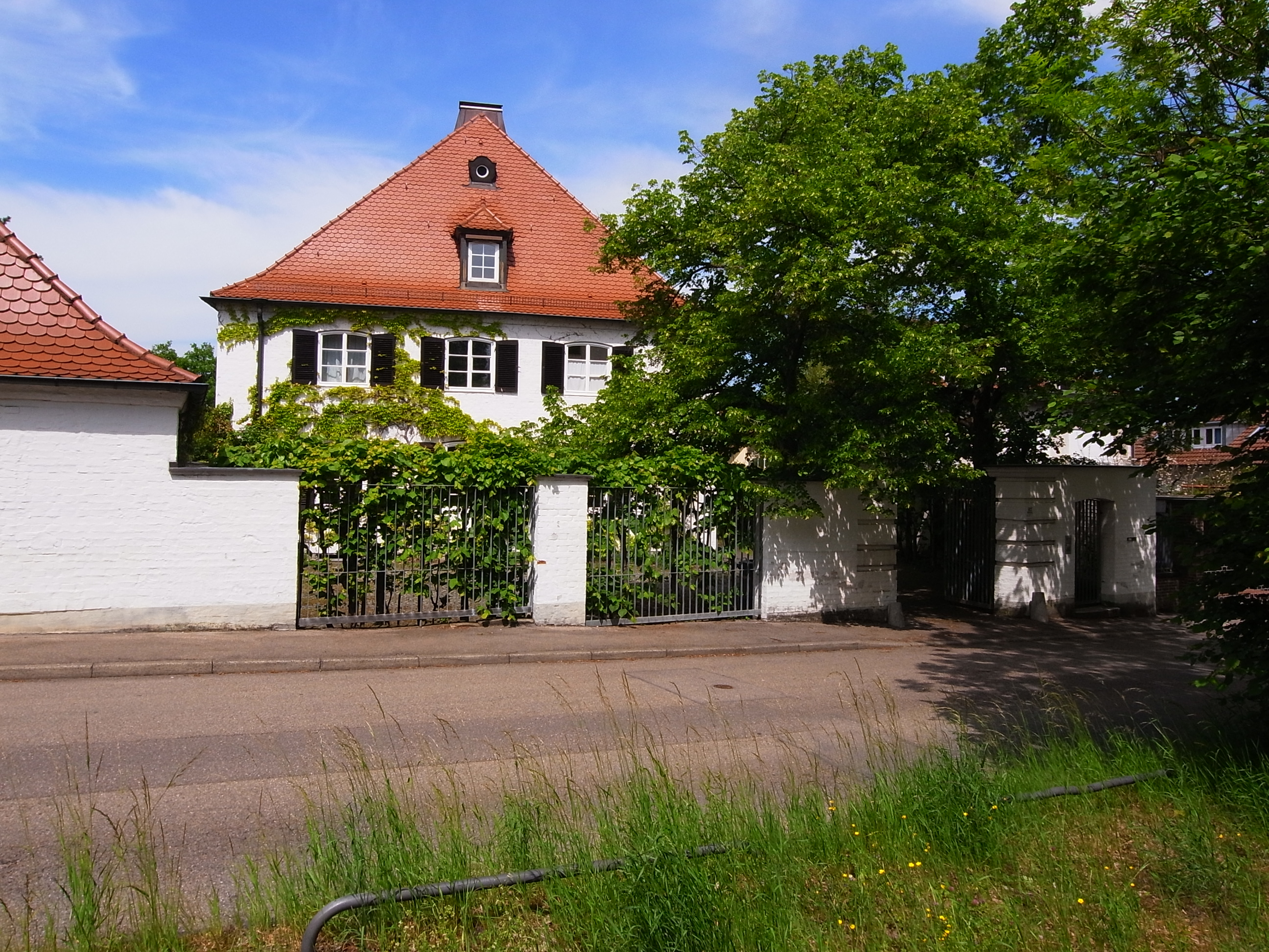 Die Villa Zerweck in der Feuerbacherheide 67 geht auf den Architekten Paul Schmitthenner zurück